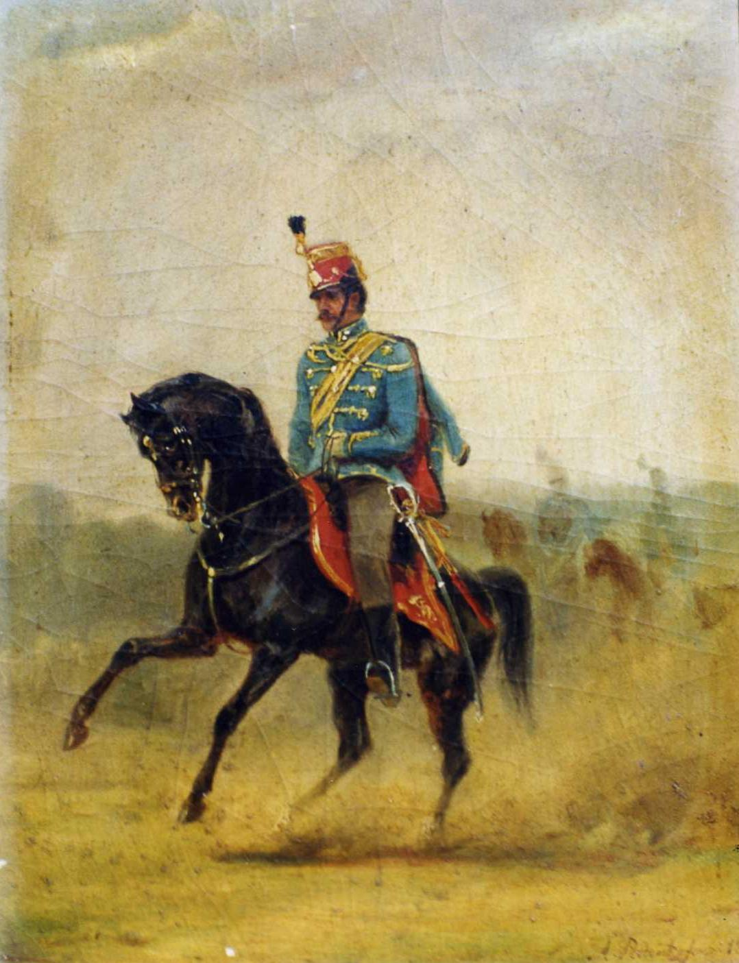 Hungarian Hussar